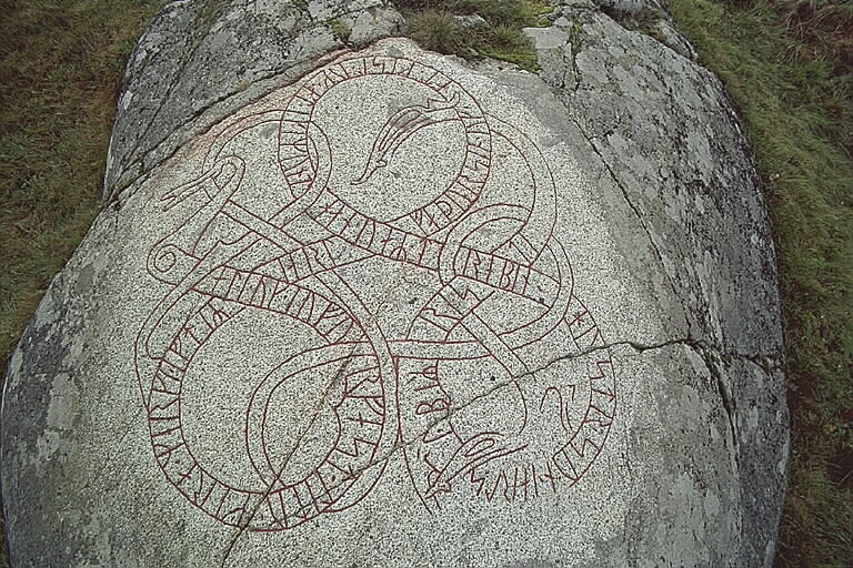 RAÄ-nummer Uppsala 337:1. Inskriften lyder: Ale (eller Alle) och Jovurfast lät göra minnesmärket efter Jarl, sin fader , och efter Gisl och efter Ingemund. Han blev dräpt österut, Jarls son. Öpir ristade.